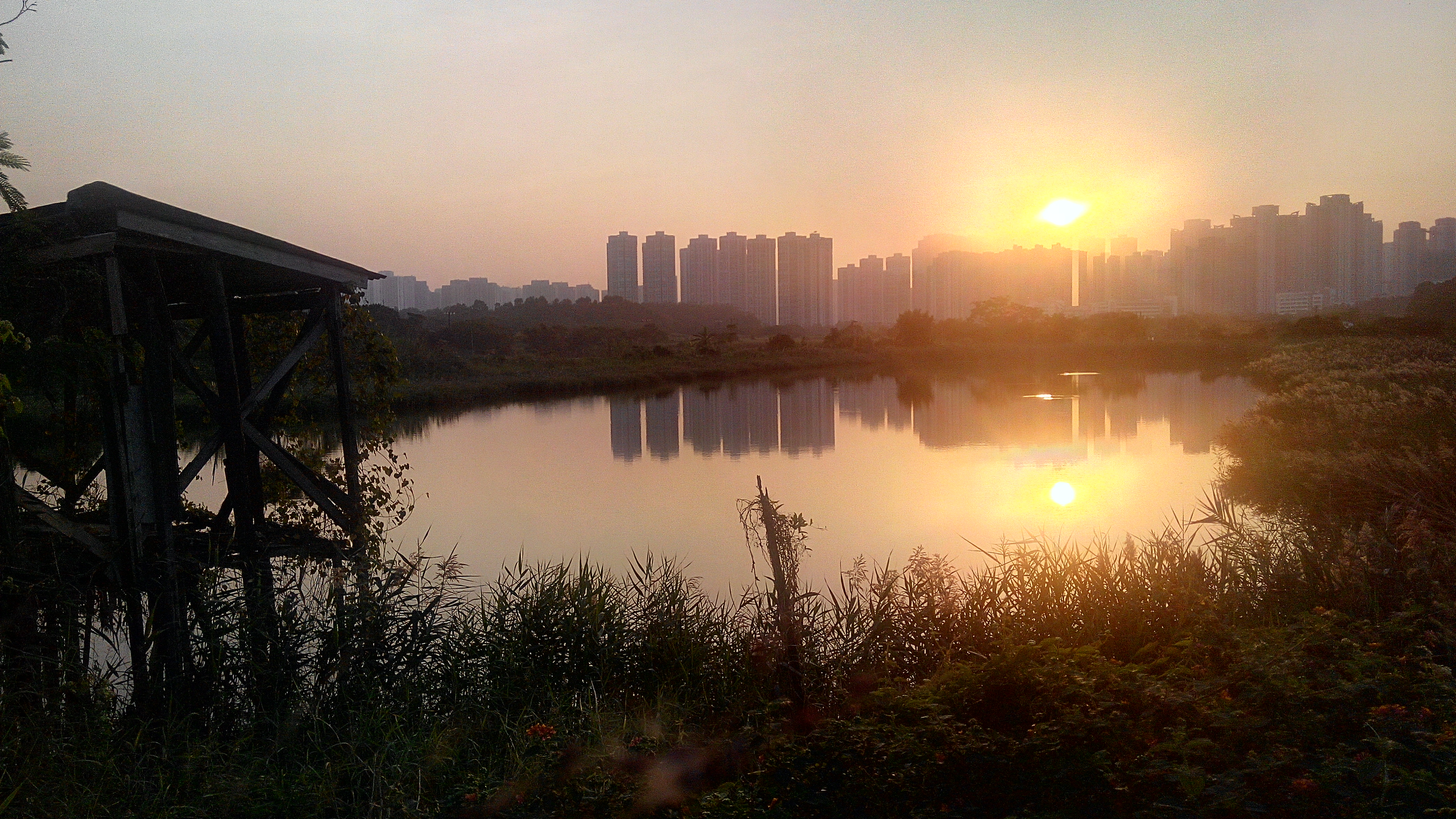 横洲大井漁塘